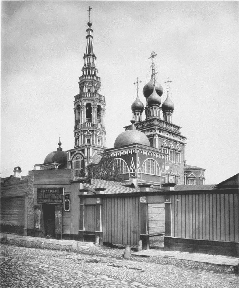 Church of Resurrection in KadashiМосква, Замоскворечье. Воскресенiя Христова, что въ Кадашахъ, въ Кадашевскомъ пер. - Пр. 4: Воскресенiя Хр., Успенiя Б. М., Тихвинской Б. М. и Николая Чуд. - Зн. въ 1625 г. (въ 1686 г. каменная).